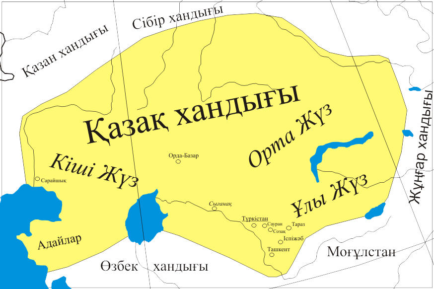 Қазақ хандығының картасы